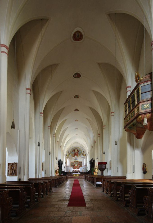 Salzburger Str. 32, 83435 Bad Reichenhall, Münster St. Zeno Genehmigung für Innenaufnahmen durch Erzbischöfliches Ordinariat München, Ressort Bauwesen und Kunst vom 21.08.2012 liegt schriftlich vor.This is a photograph of an architectural monument.